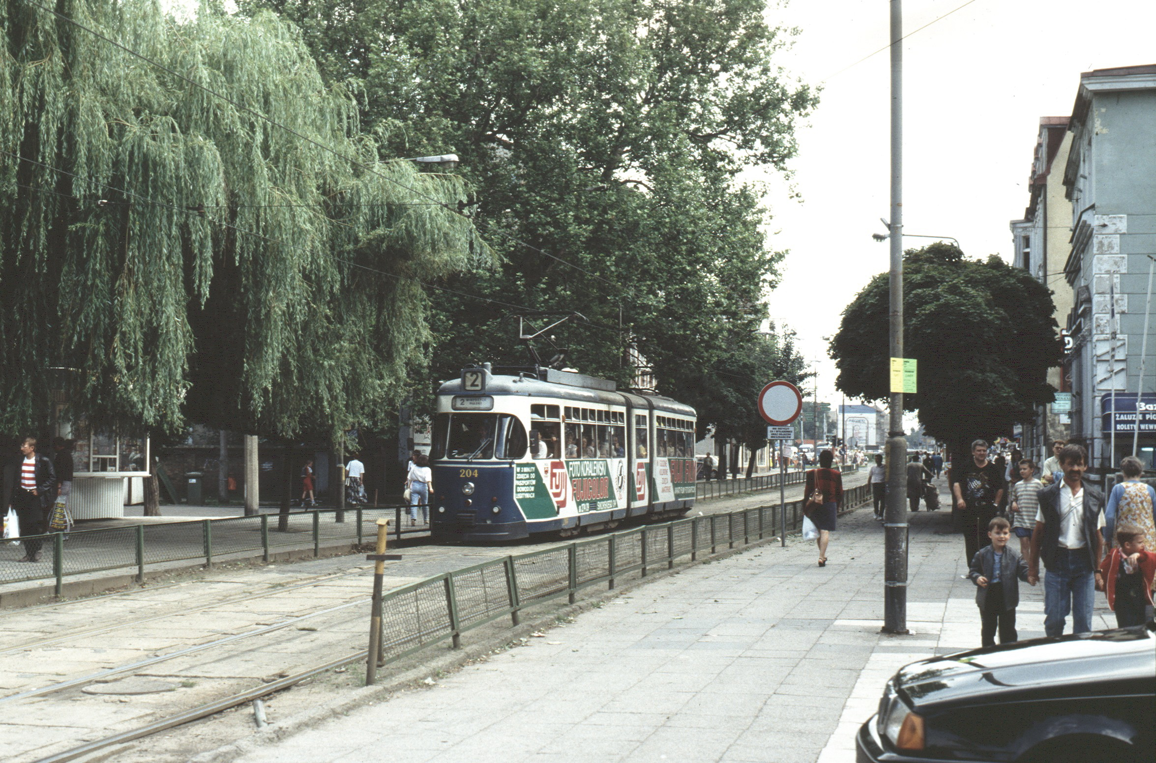 Wegmann GT6 in Gorzów Wielkopolski